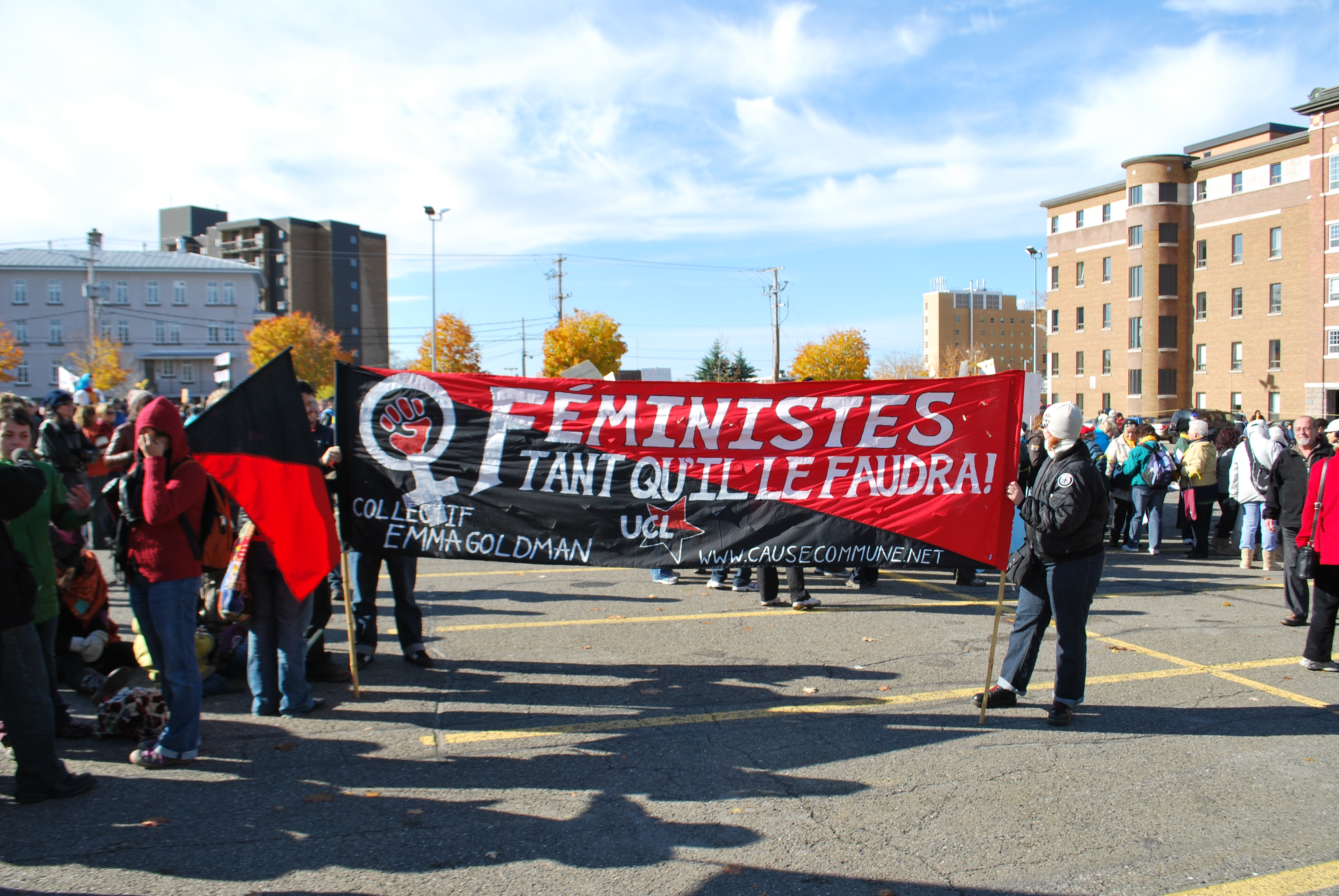 Groupes féministe québécois présents à la Marche mondiale des femmes à Rimouski 2010.